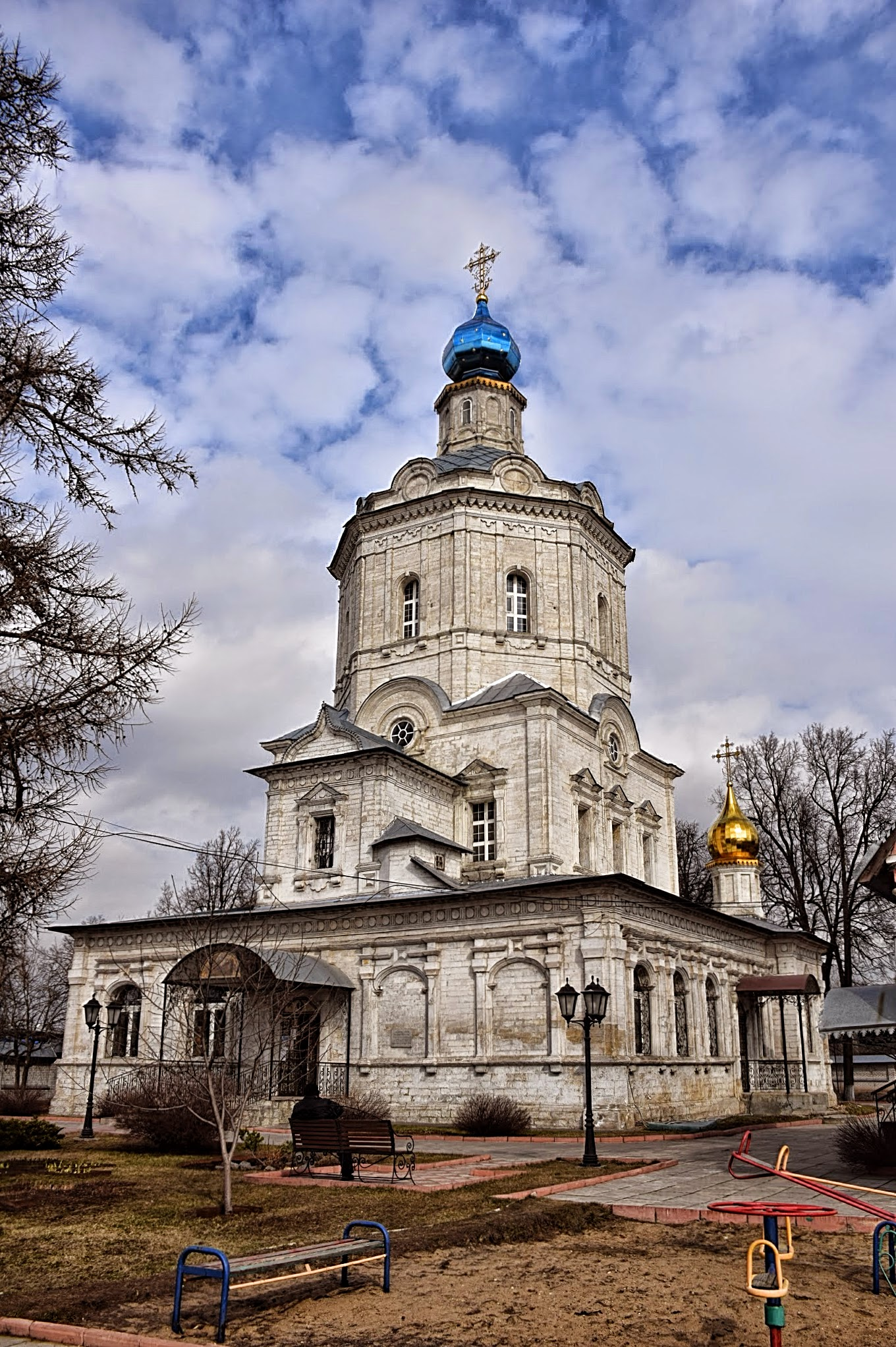 Церковь Успения Пресвятой Богородицы: Белокаменное шоссе (с. Таболово), Видное, Ленинский район, Московская область